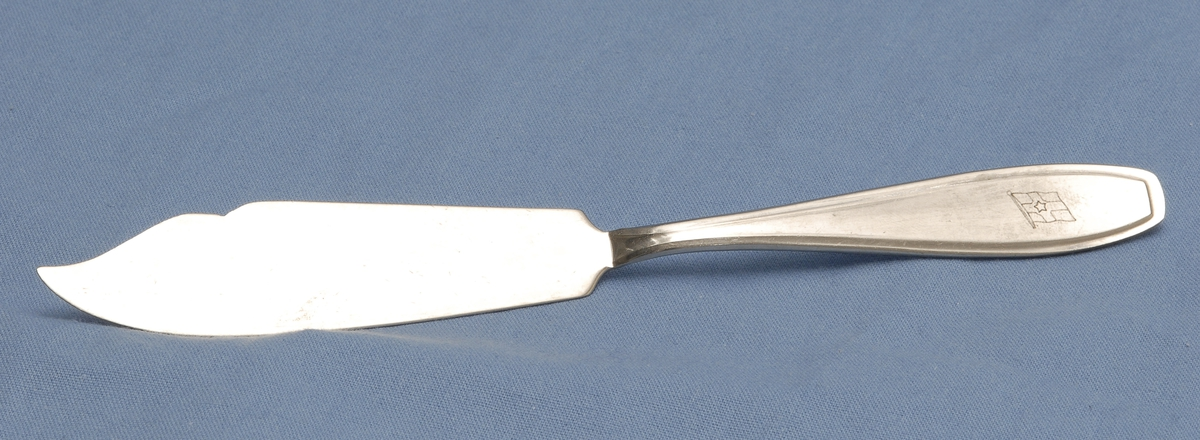 Fiskekniv i rustfritt stål stemplet 'Rostfrei 18/8' og gravert Kosmos/Jahres flagg på skaftet. Foto: Mekonnen Wolday / Kommandør Chr. Christensens Hvalfangstmuseum, SSJ.01982.